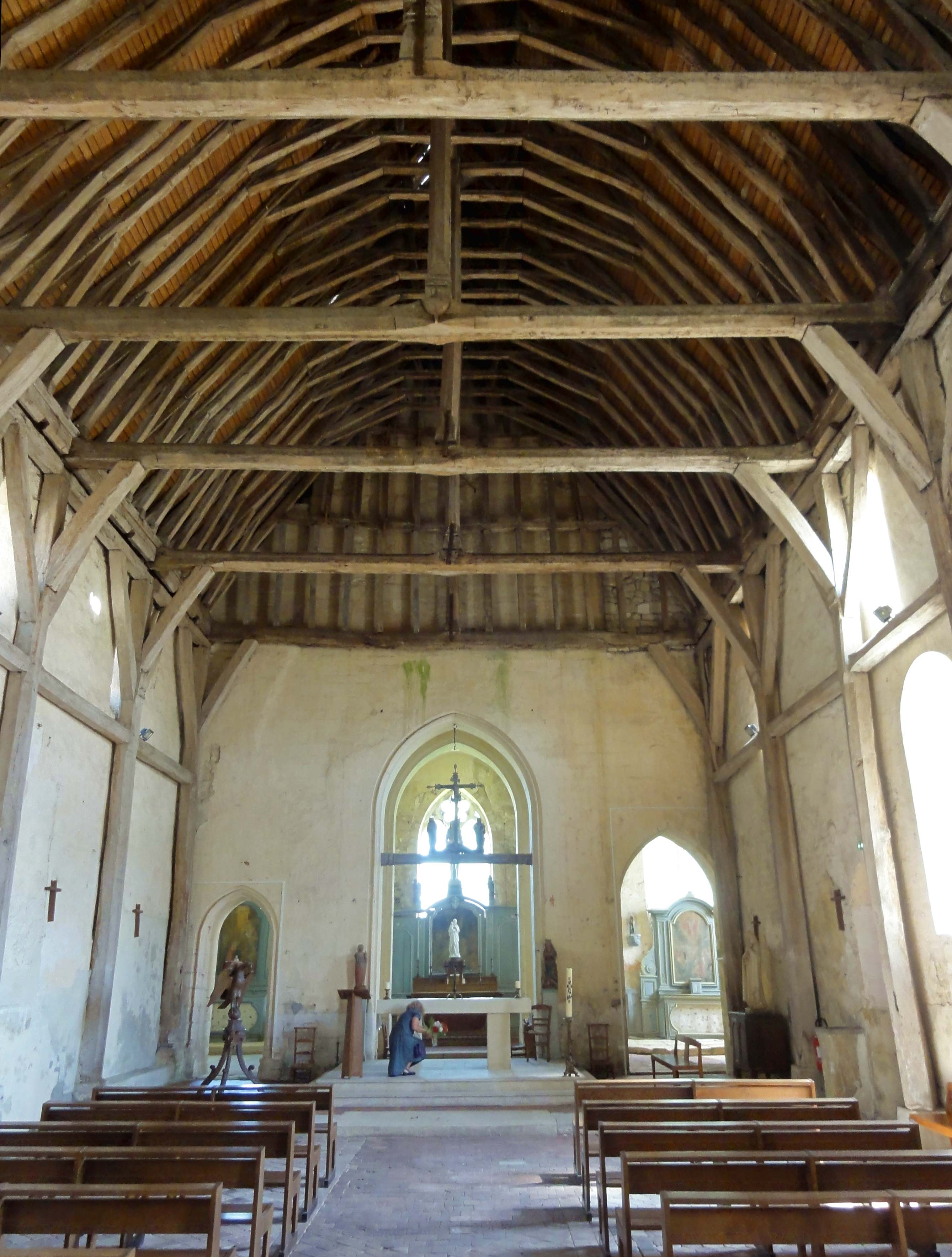 Intérieur de l'église (voir titre).